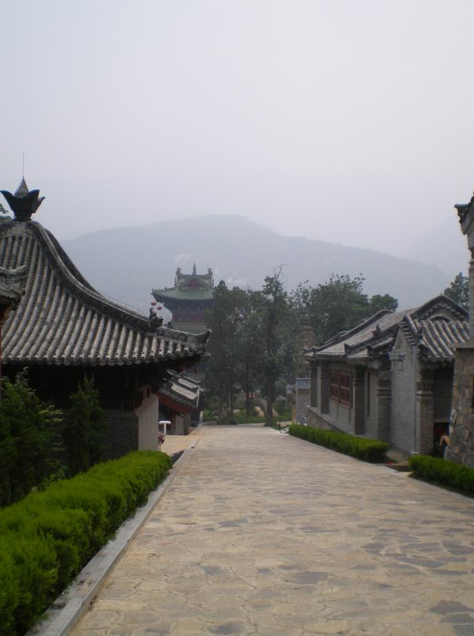 מקדש השאולין, מחוז חנאן, סין רישיון נוצר על ידי משתמש:Gsella